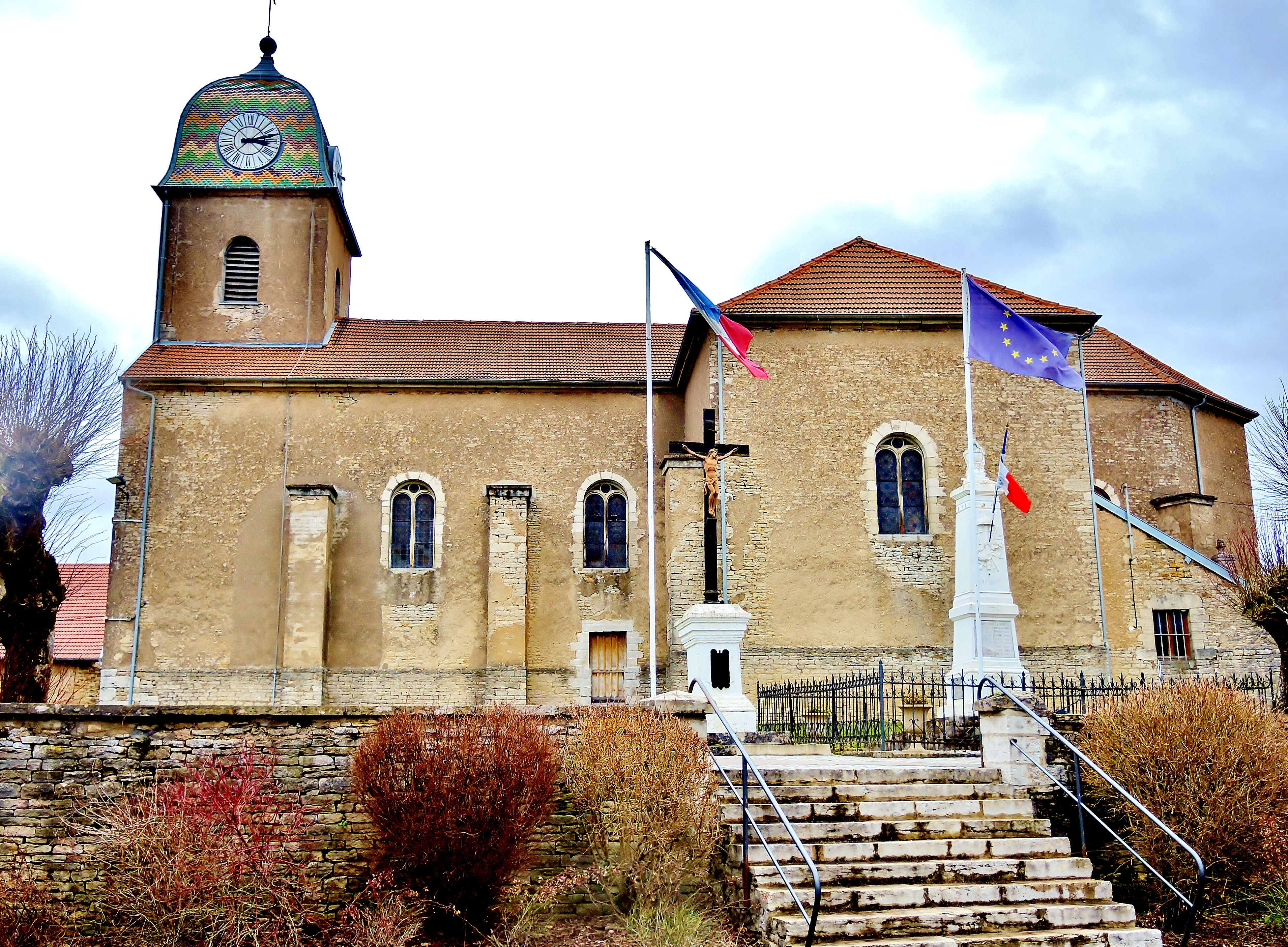 Eglise du village d'Uzelle. Département du Doubs. France.